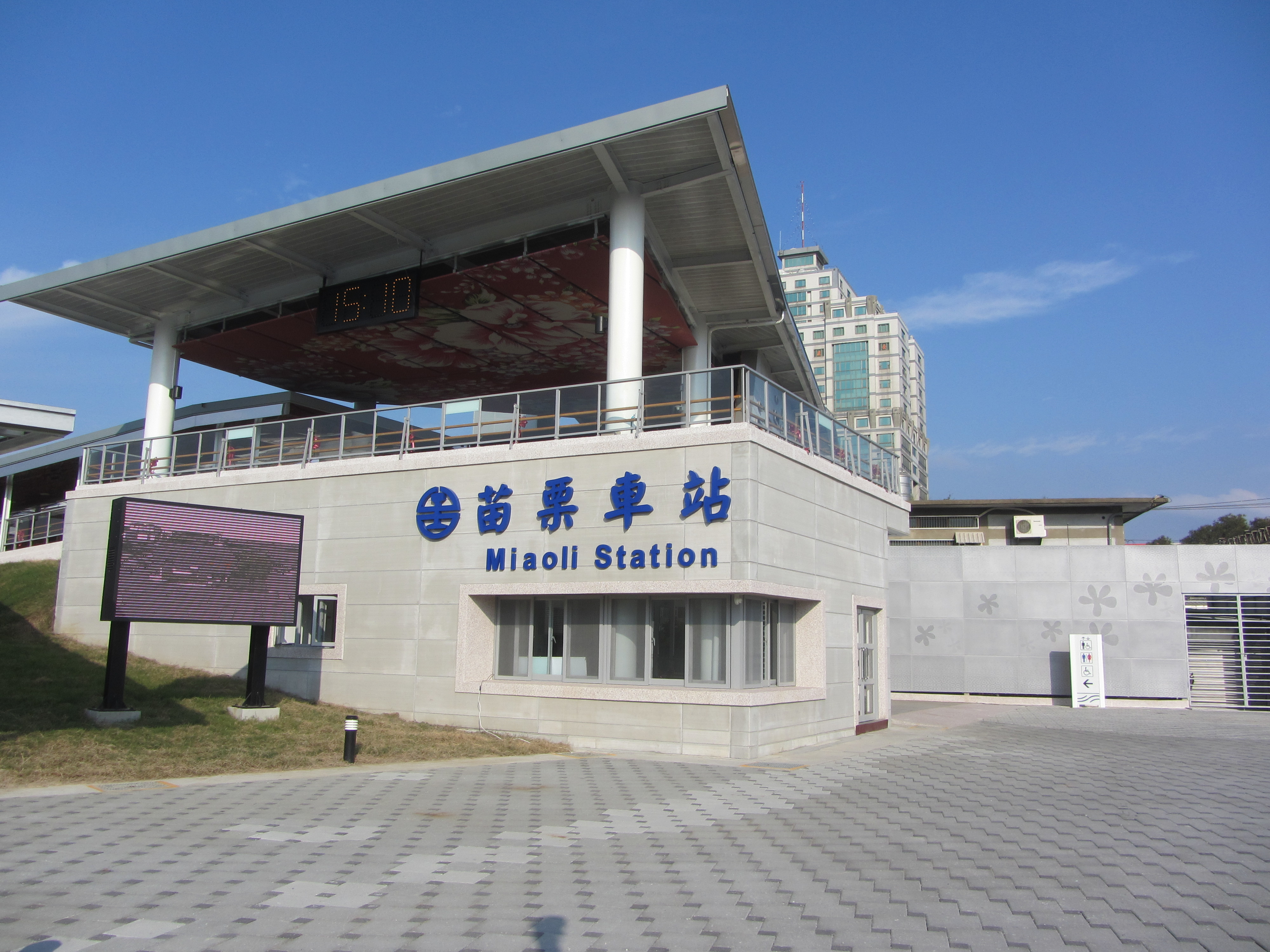 台灣鐵路管理局苗栗車站跨站式站房西側出口（後站）